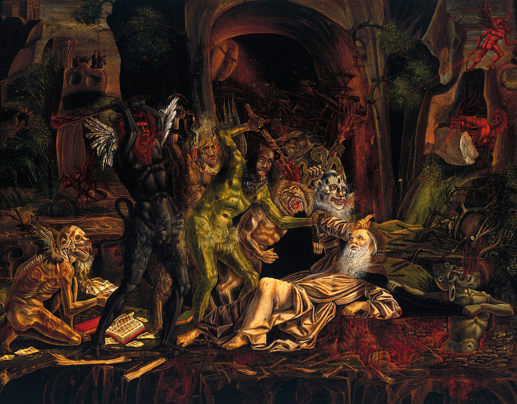 Bernardo Parentino - Tentazioni di Sant'Antonio - Galleria Doria Pamphilj, Roma 46,4 x 58,2 cm; olio su tavola